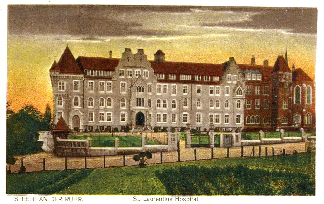 Ehemaliges St. Laurentius-Hospital in Steele, heute Stadtteil von Essen